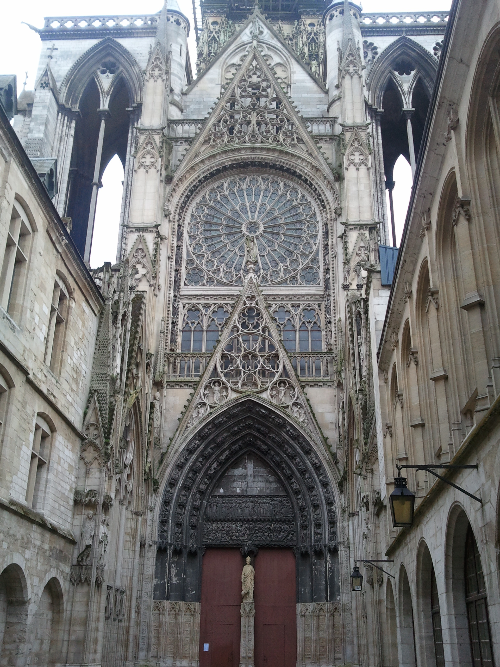 Rouen, Cathédrale Notre-Dame, Portail des Libraires